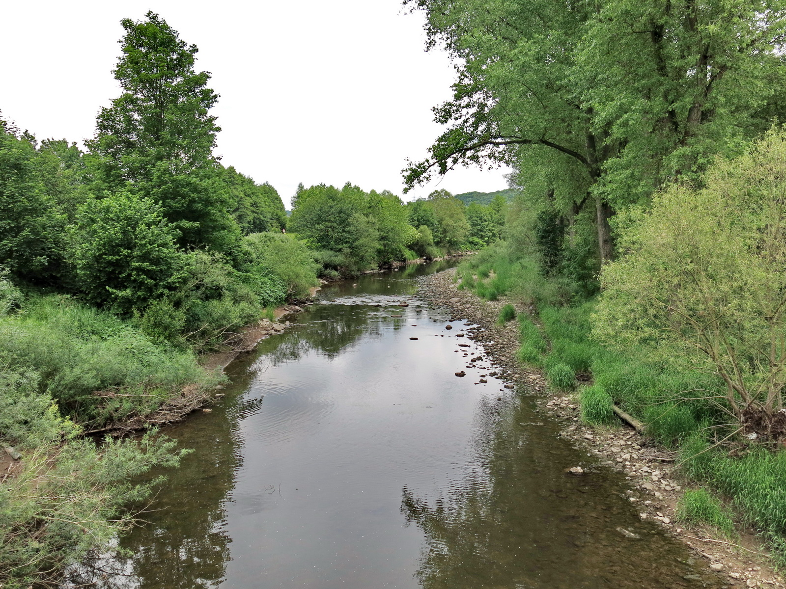 Enz im NSG-Nr. 2.096 „Enztal zwischen Niefern und Mühlacker“, Enzkreis, Baden-Württemberg